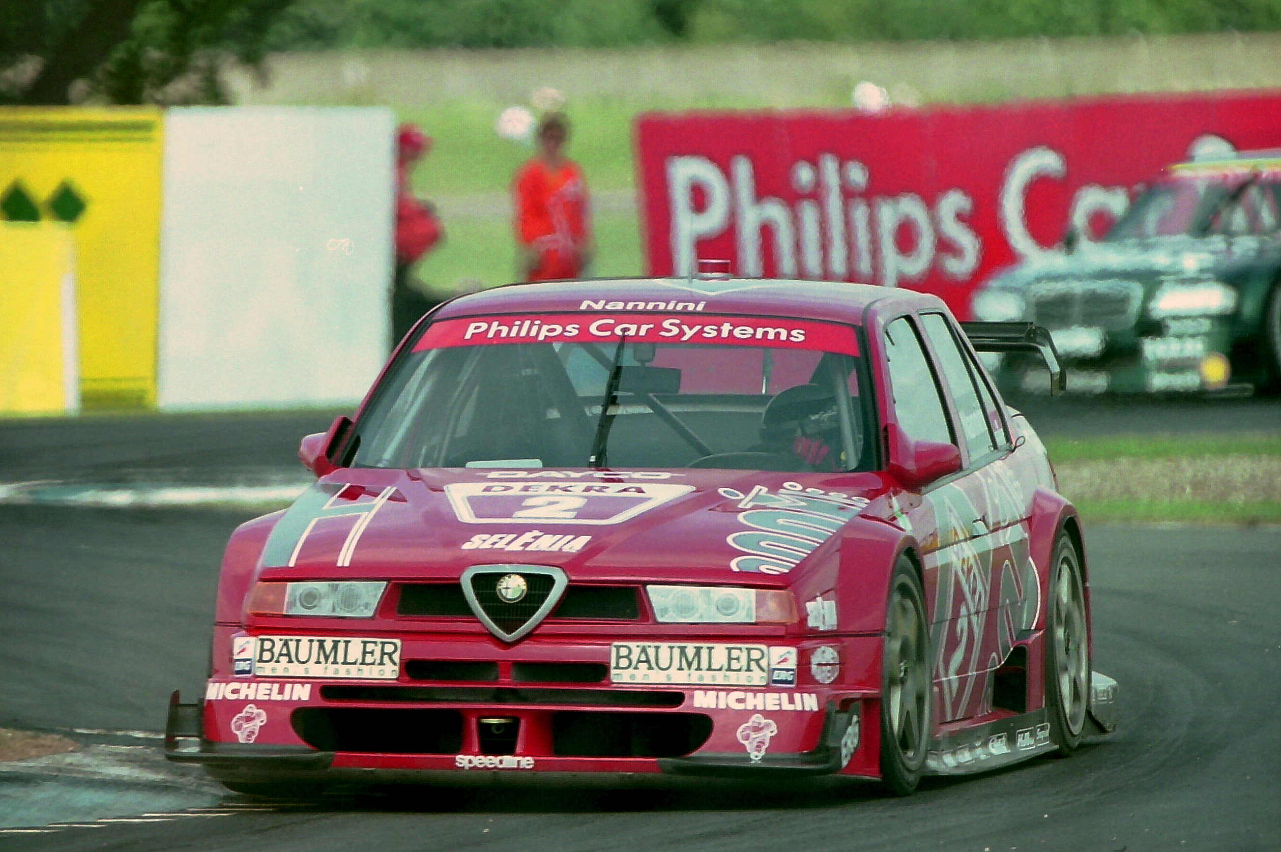 Alessandro Nannini - Alfa Corse - Alfa Romeo 155 V6 TI 94